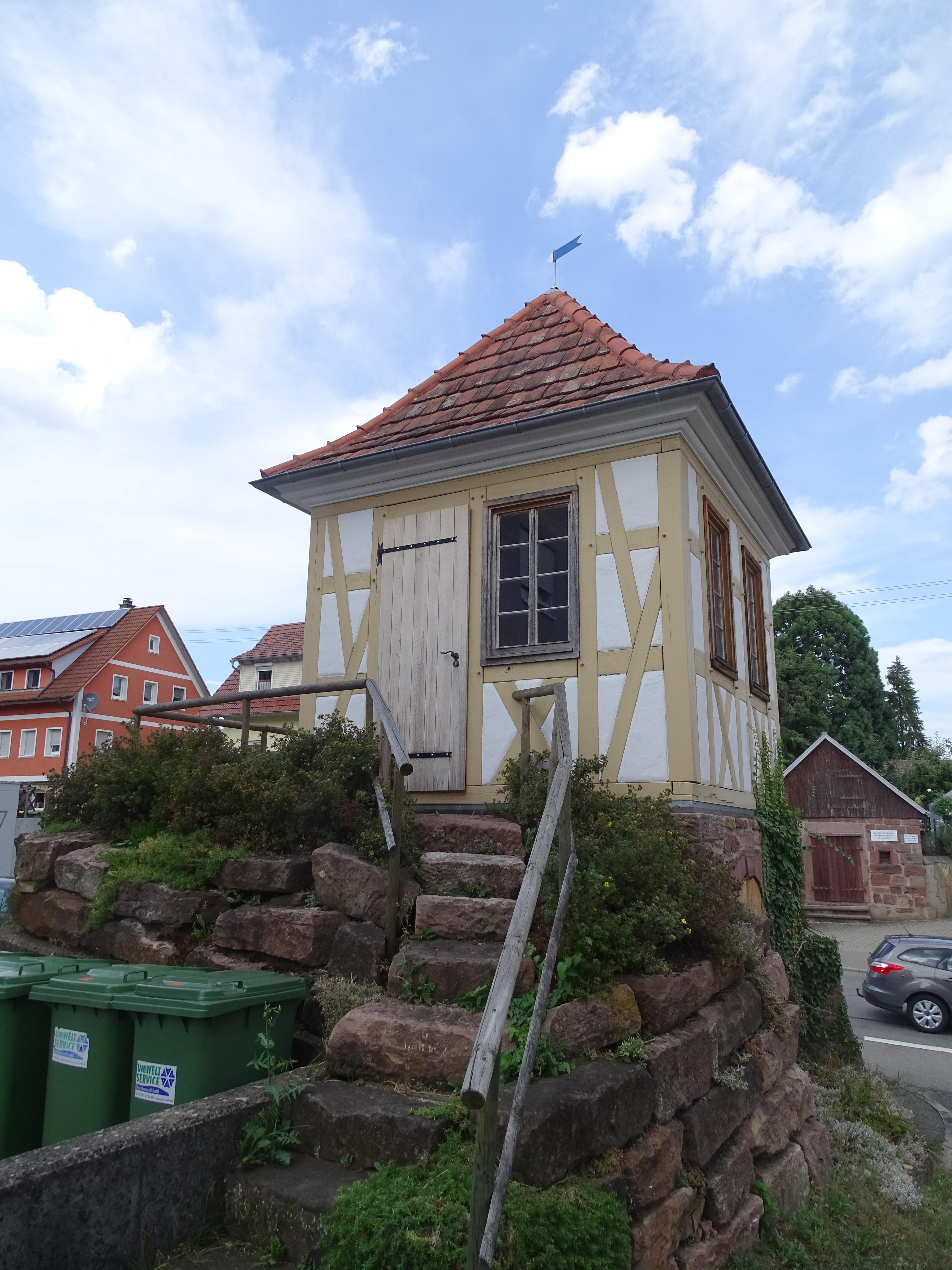 Observatorium des Johann Gottlieb Friedrich von Bohnenberger in Calw-Altburg